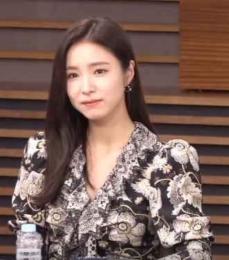 17일 오후 서울 마포구 MBC 골든마우스홀에서 MBC 새 수목 드라마 ‘신입사관 구해령’ 제작발표회가 열렸다.